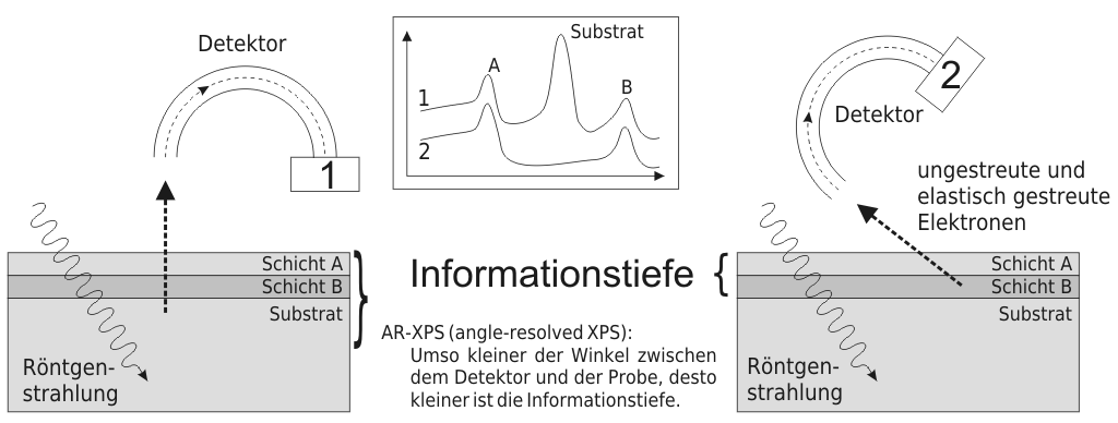 Prinzip von winkelabhängigen XPS-Messung (AR-XPS). Probe wird mit Röntgenstrahlen der Energie h*v beschossen. Dadurch wird ein kernnahes Elektron aus dem Atomverband herausgeschlagen. Folge: Es kommt zur direkten Emission eines Photoelektrons. Diese Elektronen werden, bezüglich über ihrer kinetischen Energie analysiert, die dann gegen die Intensität der emittierten Elektronen aufgetragen wird. Die so gemessenen Spektren liefern Informationen über die Bindungsenergie und somit über die Art der zugrunde liegenden Atome und deren Konzentration. Die Eindringtiefe der verwendeten Röntgenstrahlung ist um ein Vielfaches größer als die Informationstiefe (0,5-10 nm), d. h., die maximale Auslösungstiefe von Elektronen die ohne Energieverlust am Detektor ankommen. Die Informationstiefe kann durch Änderung des Detektionswinkels etwas variiert werden, denn bei einem flacheren Winkel müssen die Elektronen eine längere Strecke im Material zurücklegen, wodurch die Wahrscheinlichkeit von Energieverlust durch Stoßprozesse erhöht wird.